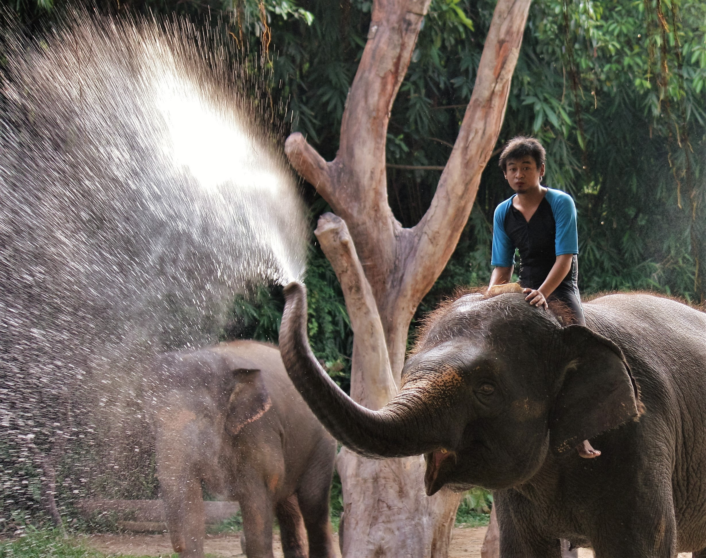 Zoo Guangzhou